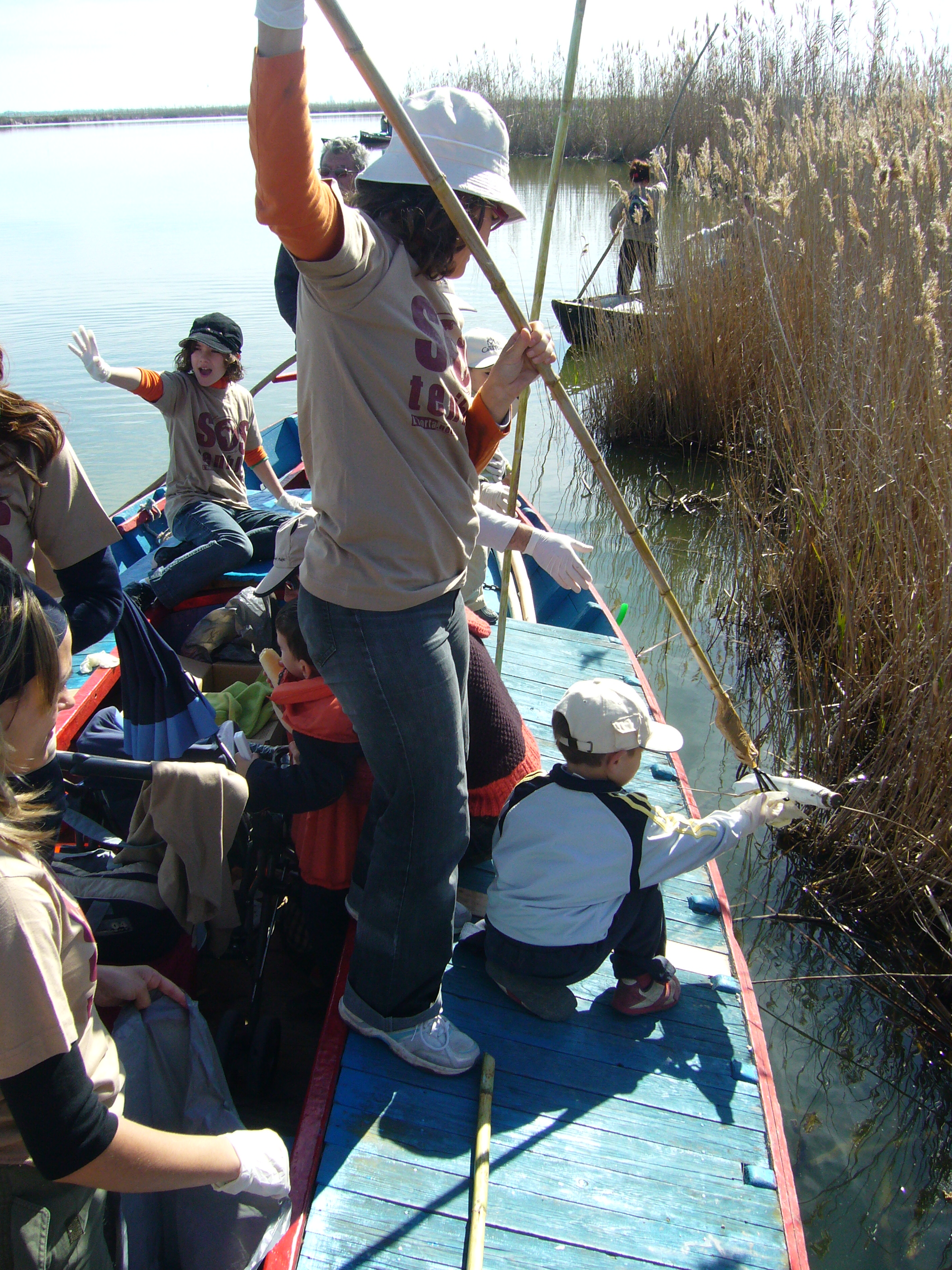 Voluntariat a l'Albufera, netejant les motes al 2008